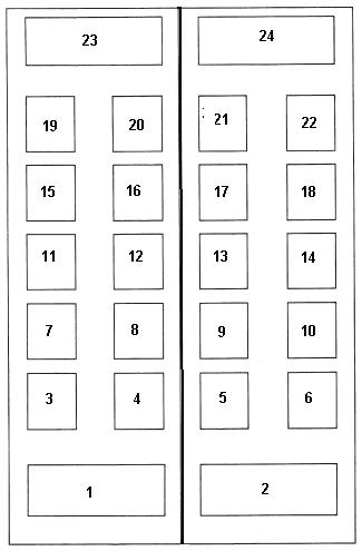 l'ho fatta io con paint su modello